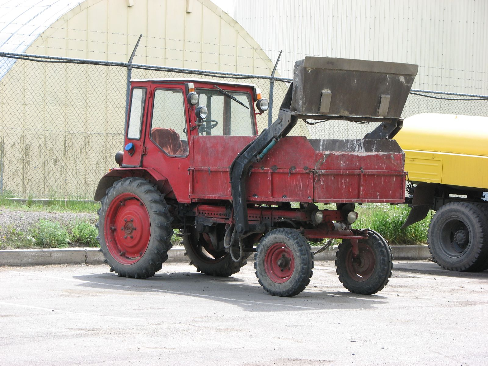 Трахтур